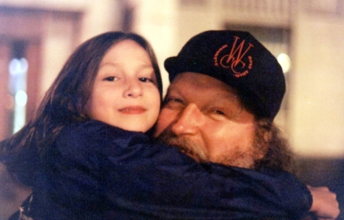 Сергей Владимирский с участницей детского ансамбля «Гренадита», музыкальным руководителем которого он был, 1999 год.